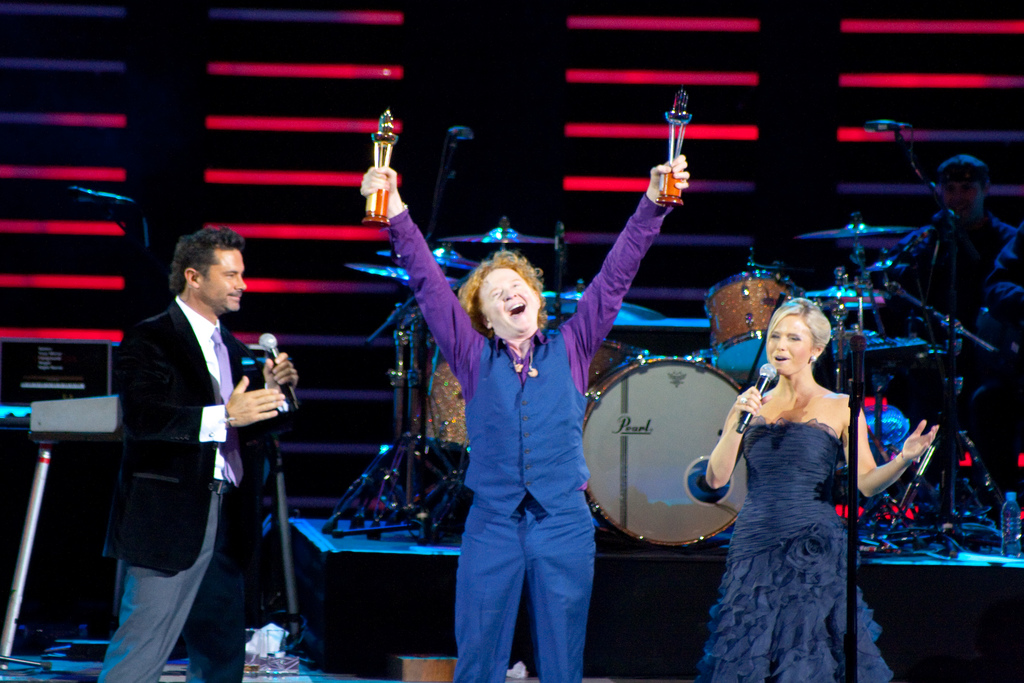 Simply Red en en festival de Viña del Mar, Chile. Recibiendo las dos antorchas como premio.